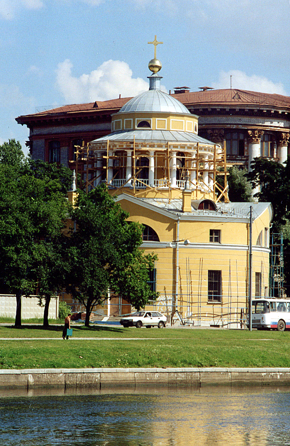 Церковь на Приморском шоссе